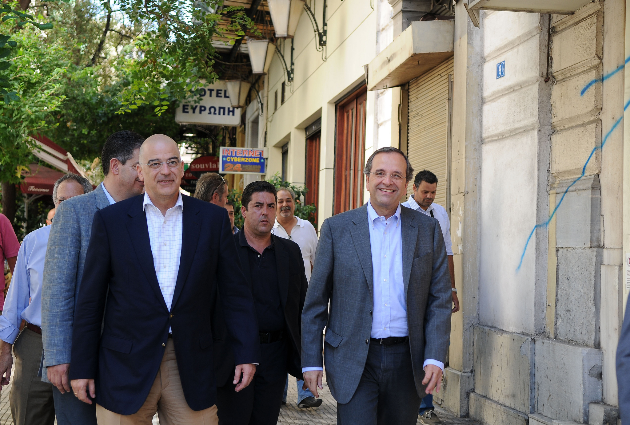 Αντώνης Σαμαράς - Επίσκεψη στην Ομόνοια